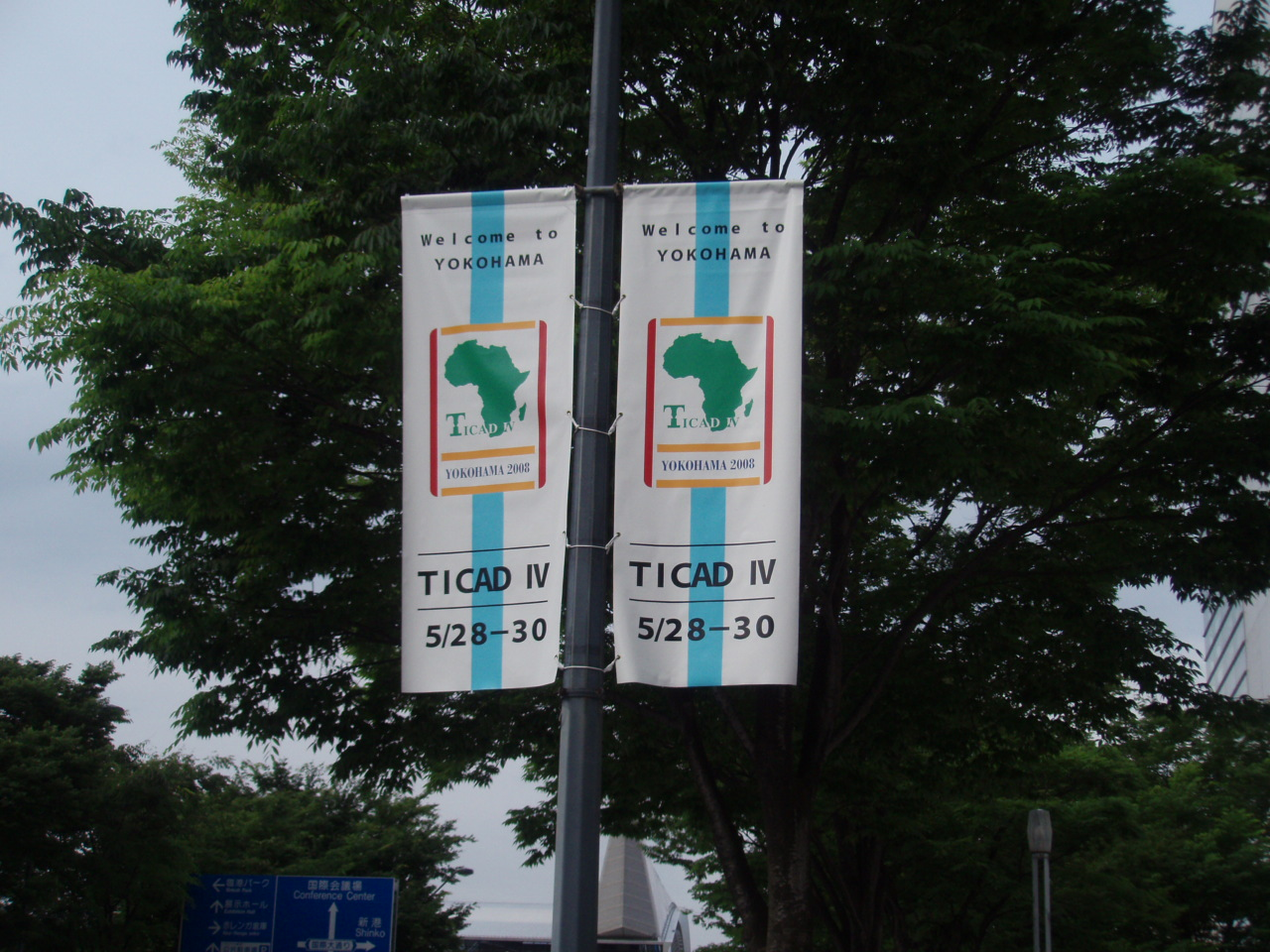 TICAD_4 Banner(Yokohama Japan)